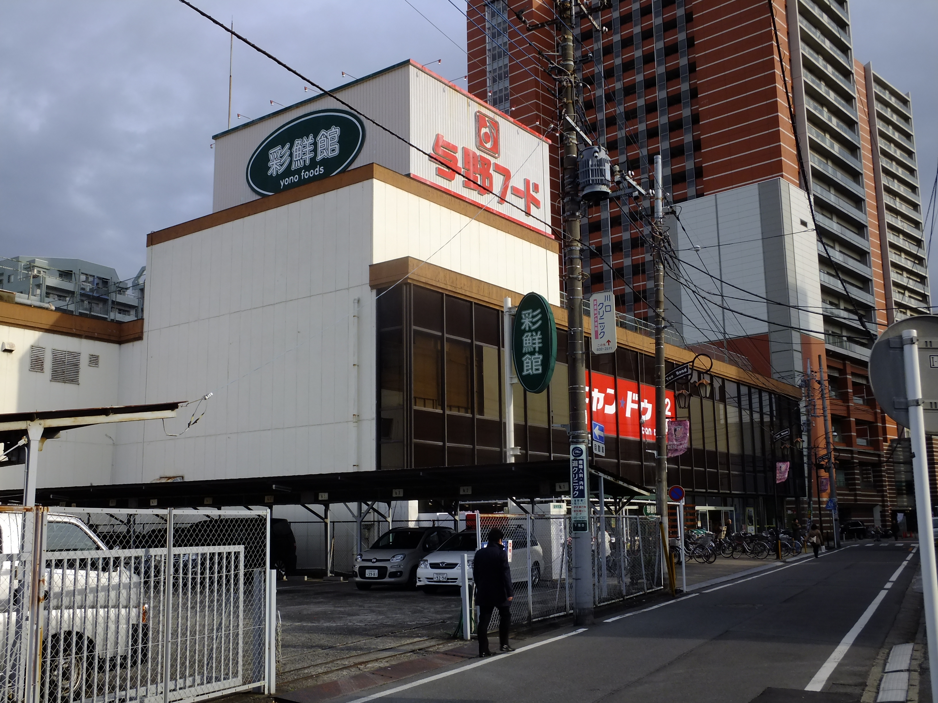 与野フードセンター、彩鮮館